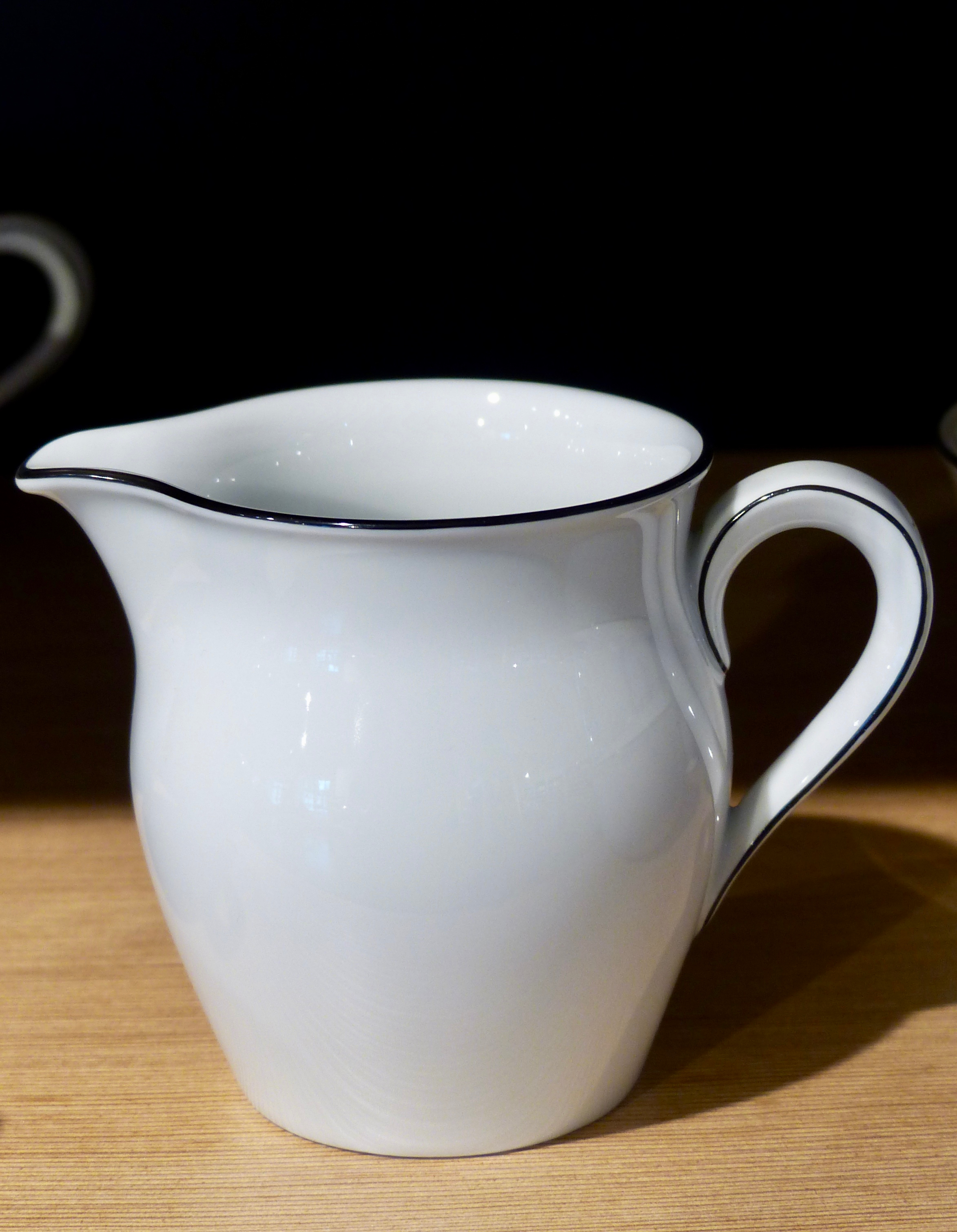 Geschirrteil des Service Wagenfeld 639 GLAM-on-Tour: Porzellanmanufaktur Fürstenberg Wikipedianer fotografierten vom 6.– 8. Oktober 2017 die Ausstellungstücke im Museum Schloss Fürstenberg, Glasmuseum Boffzen und im Kragstuhlmuseum. This photo was taken during a project supported by WMDE Gefördert von / Supported by: Wikimedia Deutschland, Museum Schloss Fürstenberg, Glasmuseum Boffzen und Kragstuhlmuseum Für das Museum Schloss Fürstenberg: This work is free and may be used by anyone for any purpose. If you wish to use this content, you do not need to request permission as long as you follow any licensing requirements mentioned on this page.